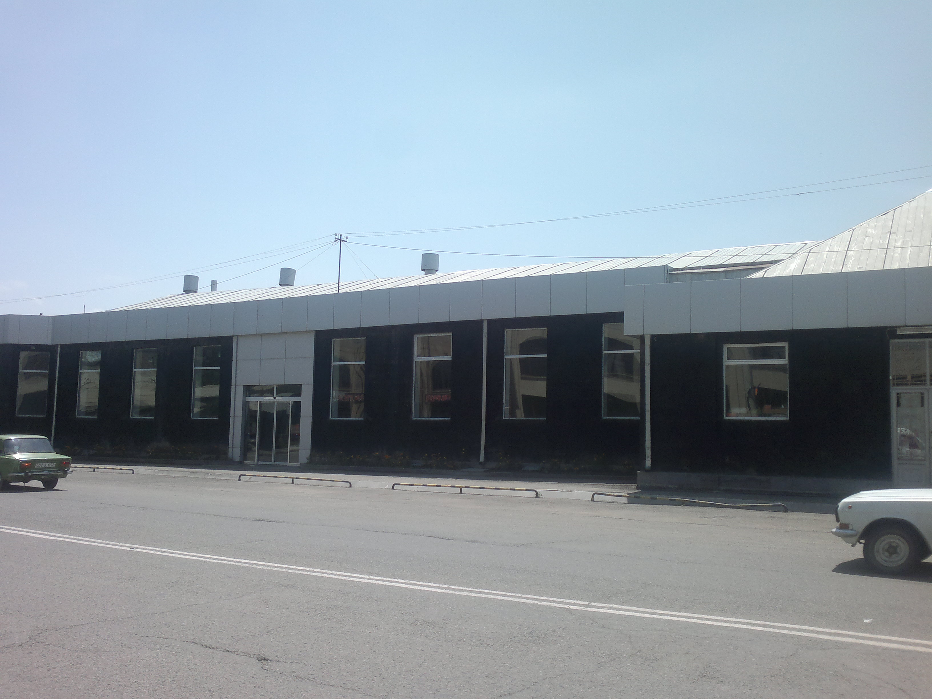 Հրուշակեղենի ֆաբրիկայի շենք